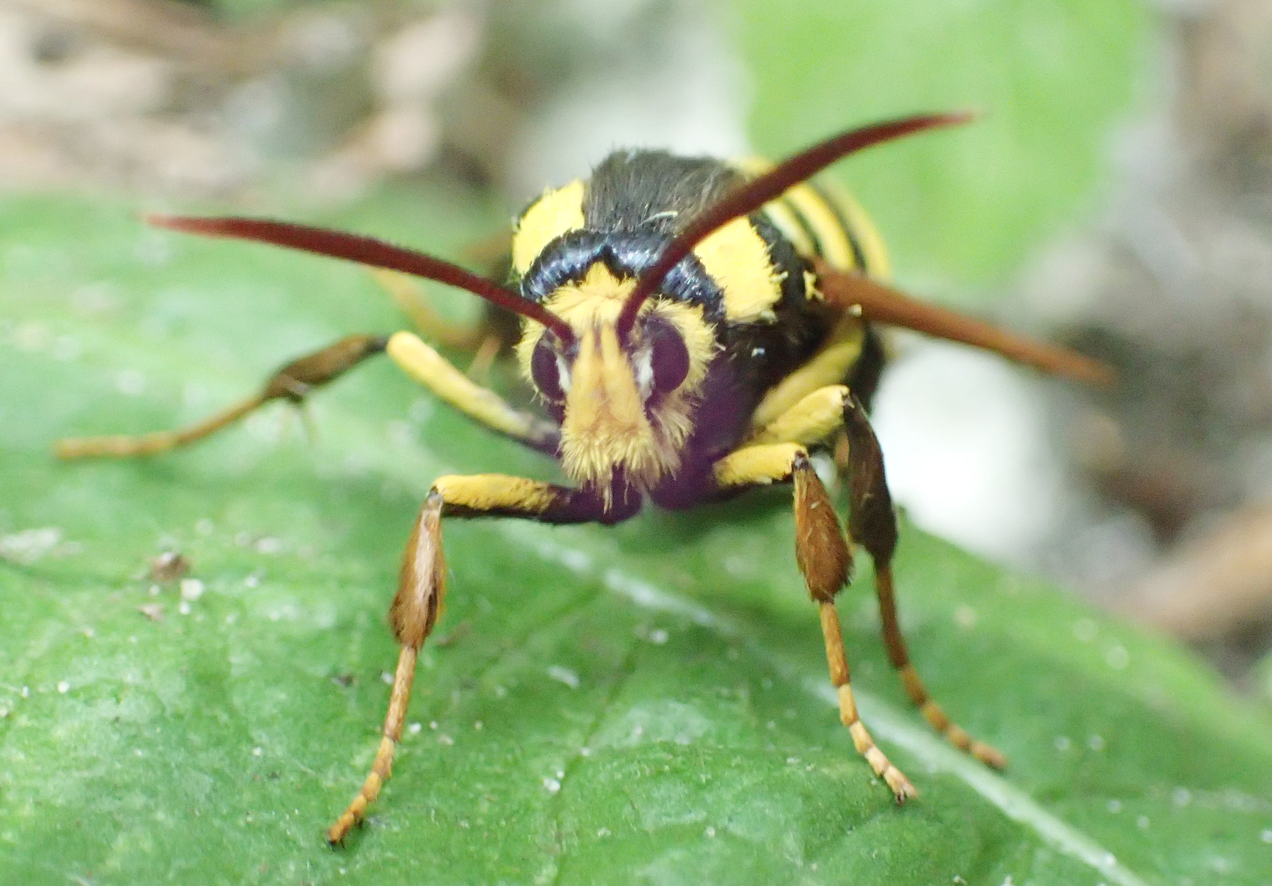 Sesia apiformis aus Norddeutschland, bei 17111 Verchen am Fuß einer Pappel